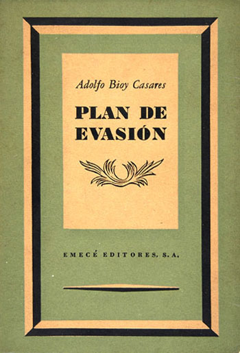 Primera edición de la novela Plan de Evasión, del escritor argentino Adolfo Bioy Casares.